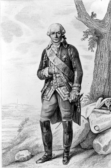 Rochambeau (Jean Bapte. Donatien Vimeur, Comte de), Maréchal de France